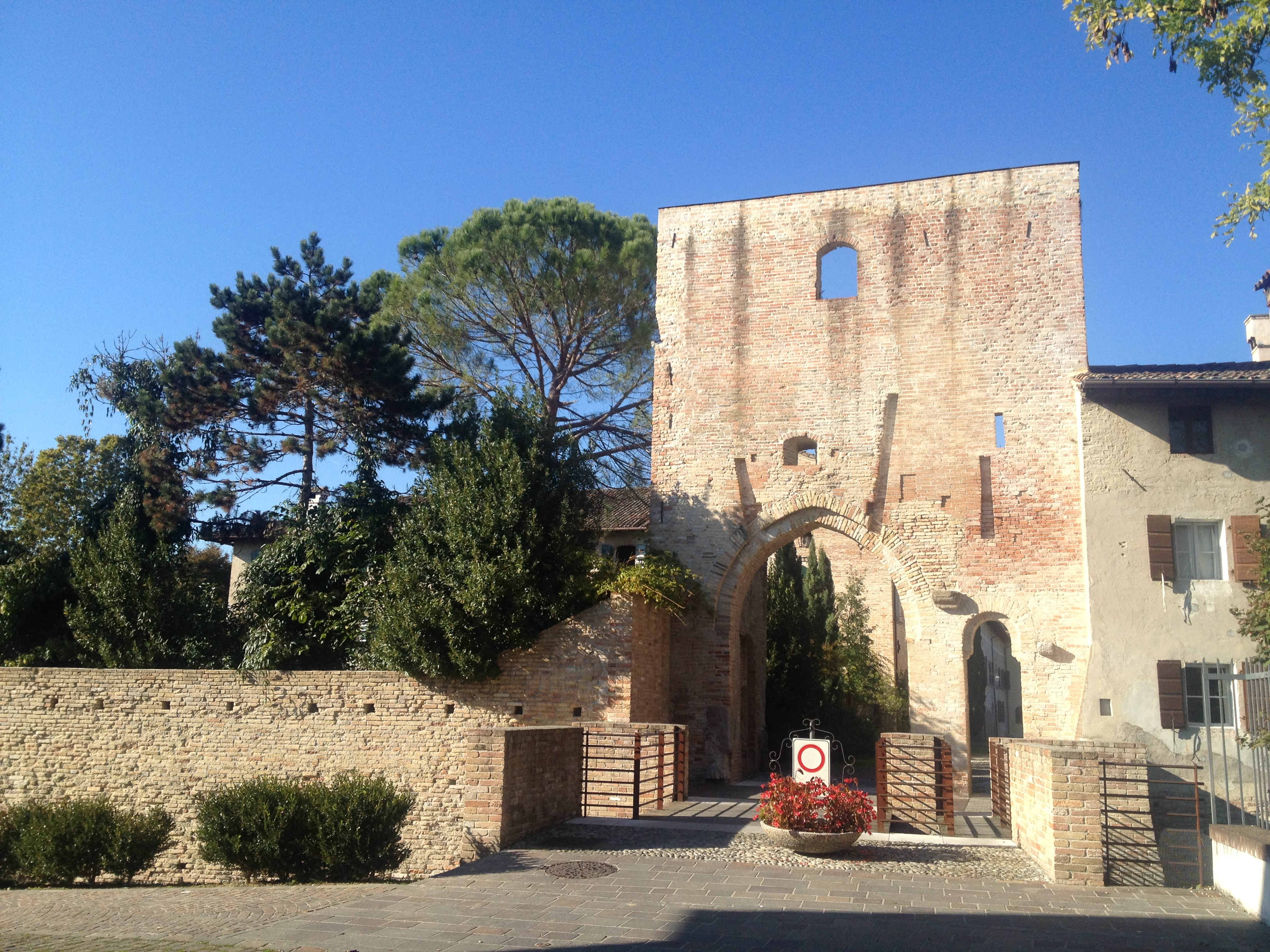 Castello Torre Sud This is a photo of a monument which is part of cultural heritage of Italy.